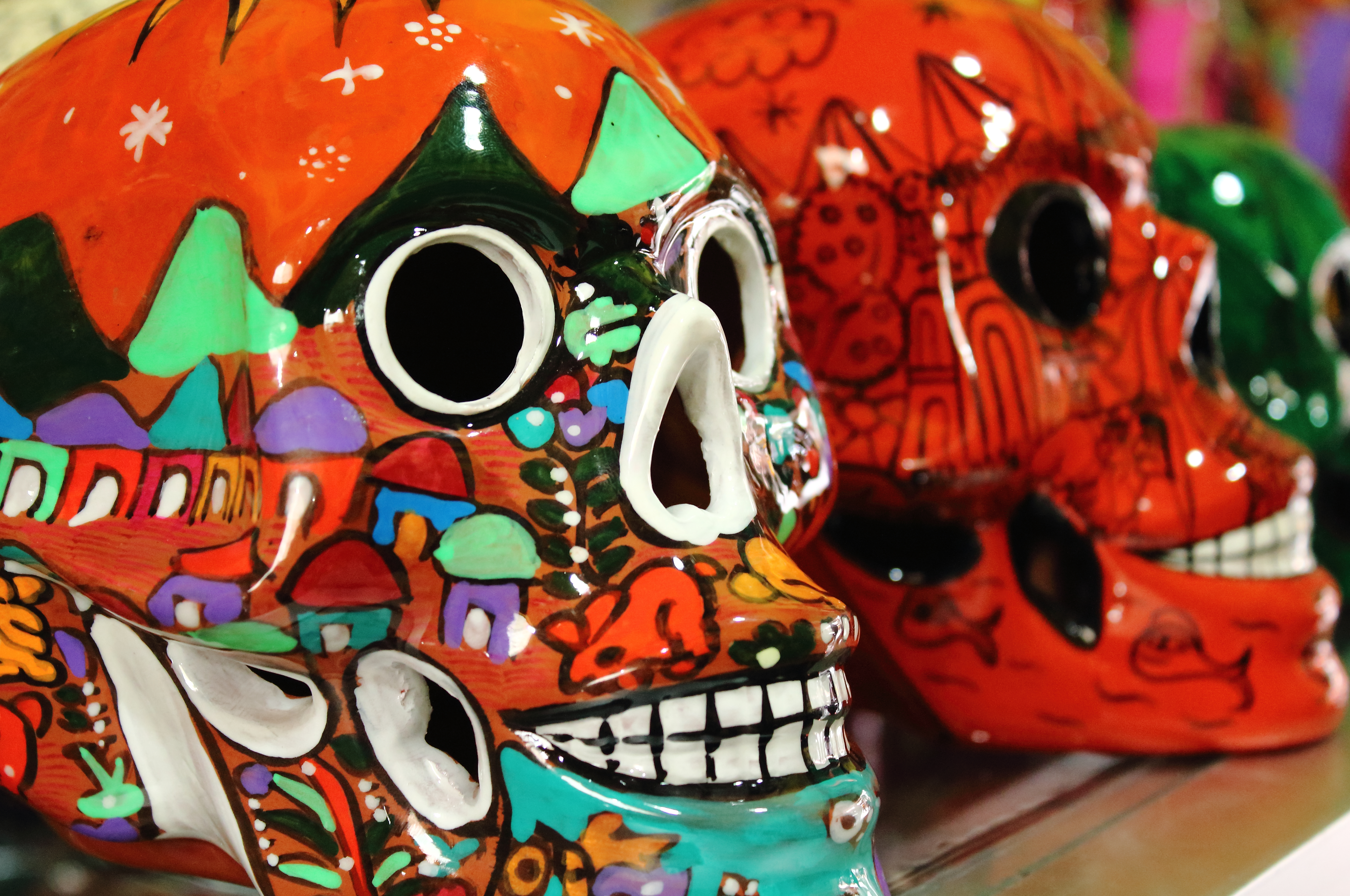 Cráneo de cerámica decorado.